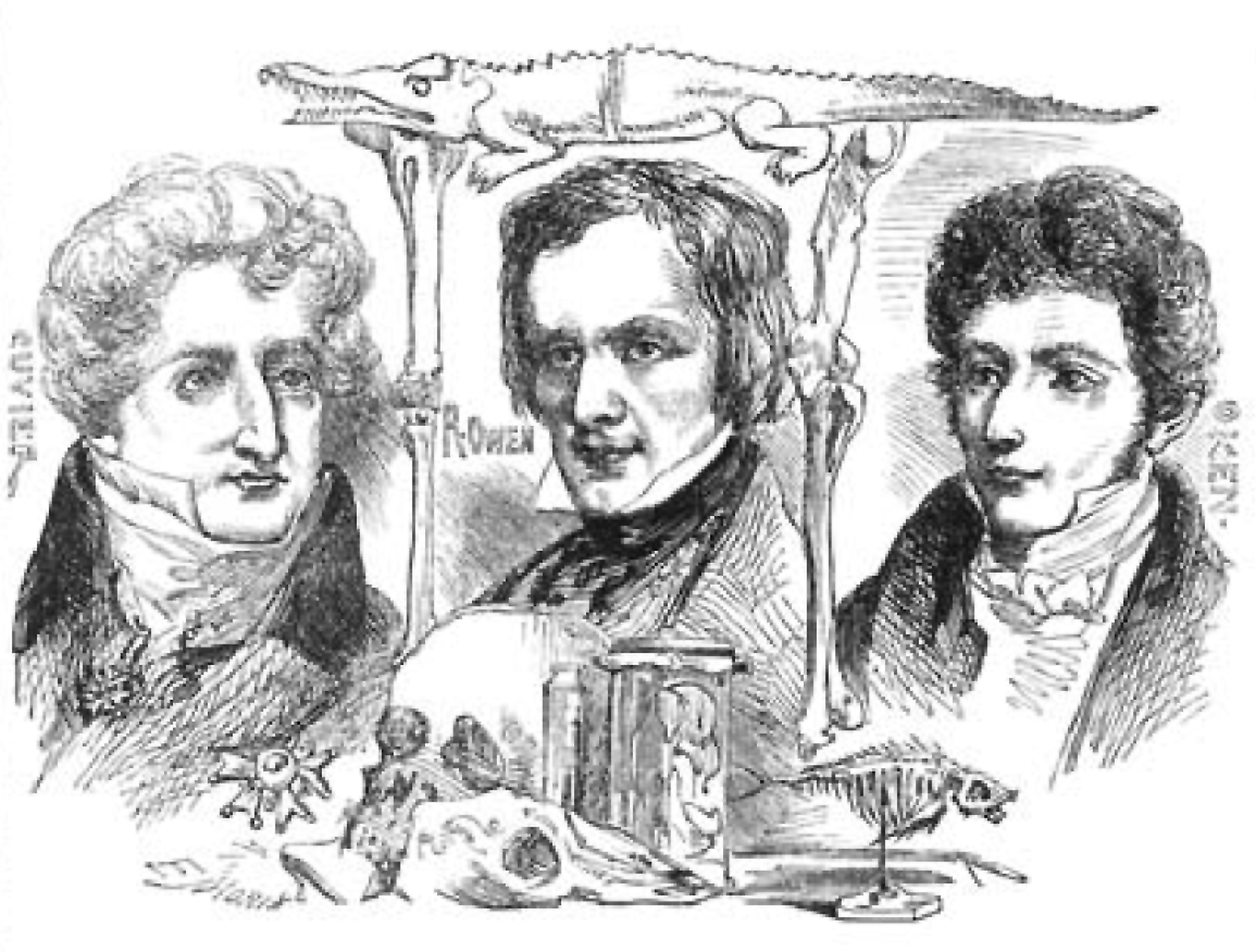 Georges Cuvier, Richard Owen, Lorenz Oken